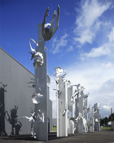 Monumental_scultpure_les_Otimistes